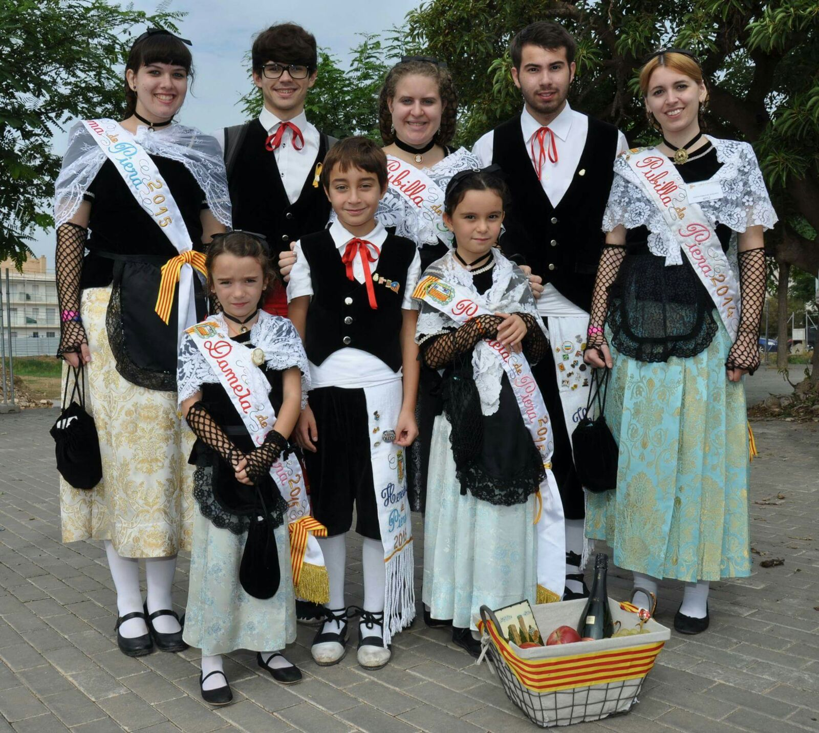 Pubillatge